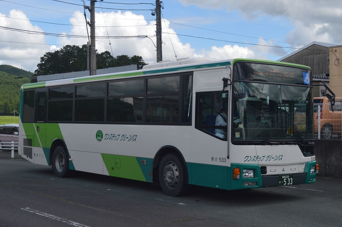 愛知県新城市で運行されている新城市Sバス。